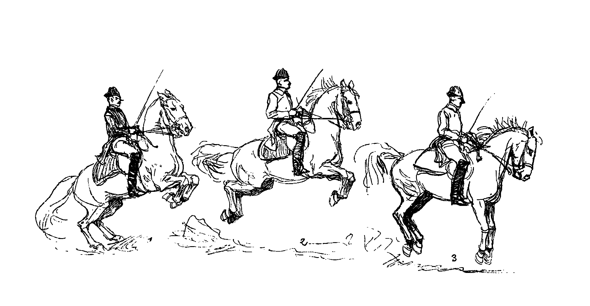 Ausschnitt aus "Ballotade und Courbette"